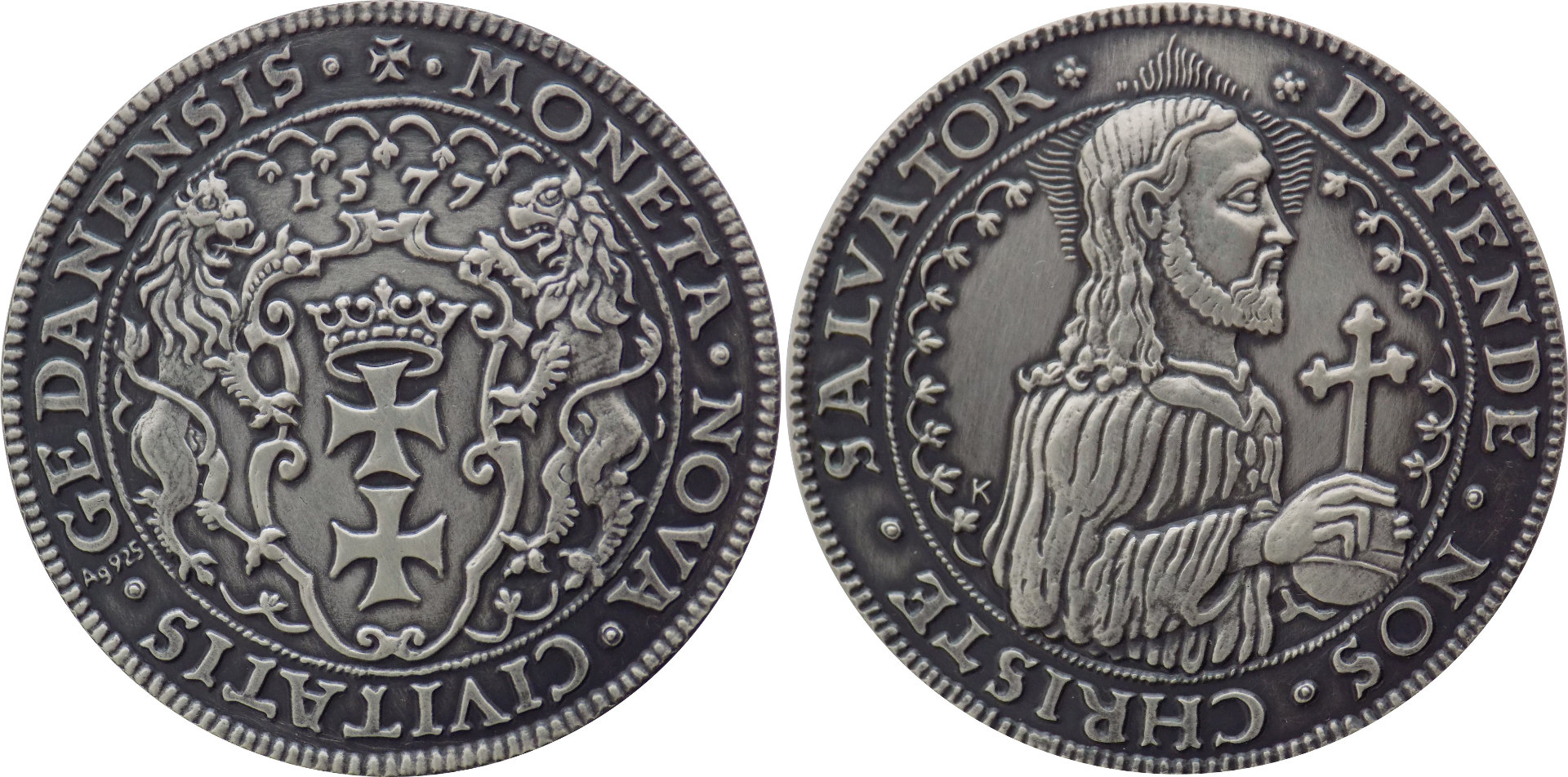 talar 1577 Gdansk - replika